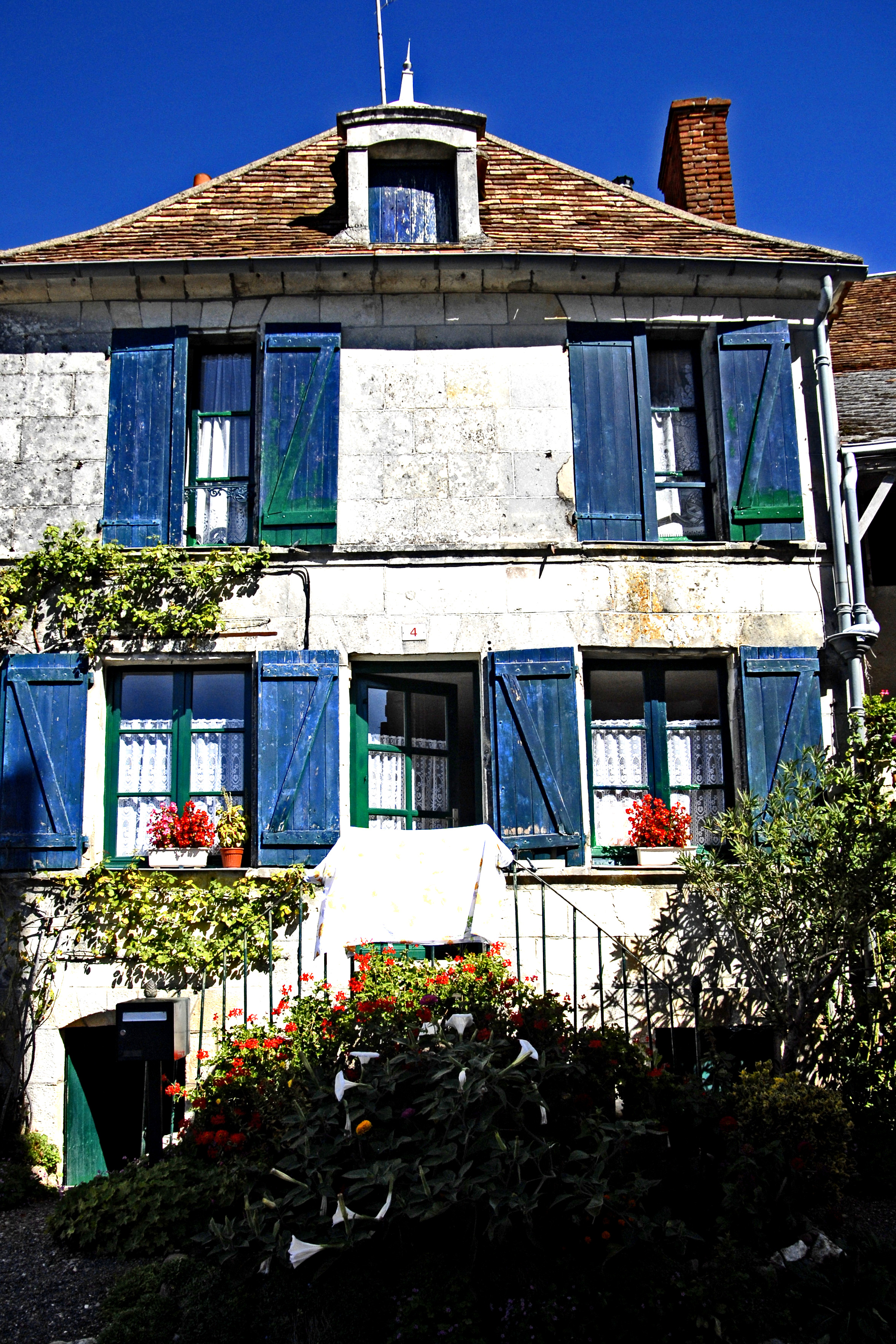 Angles-sur-l'Anglin, Haus mit blauen Schlagläden